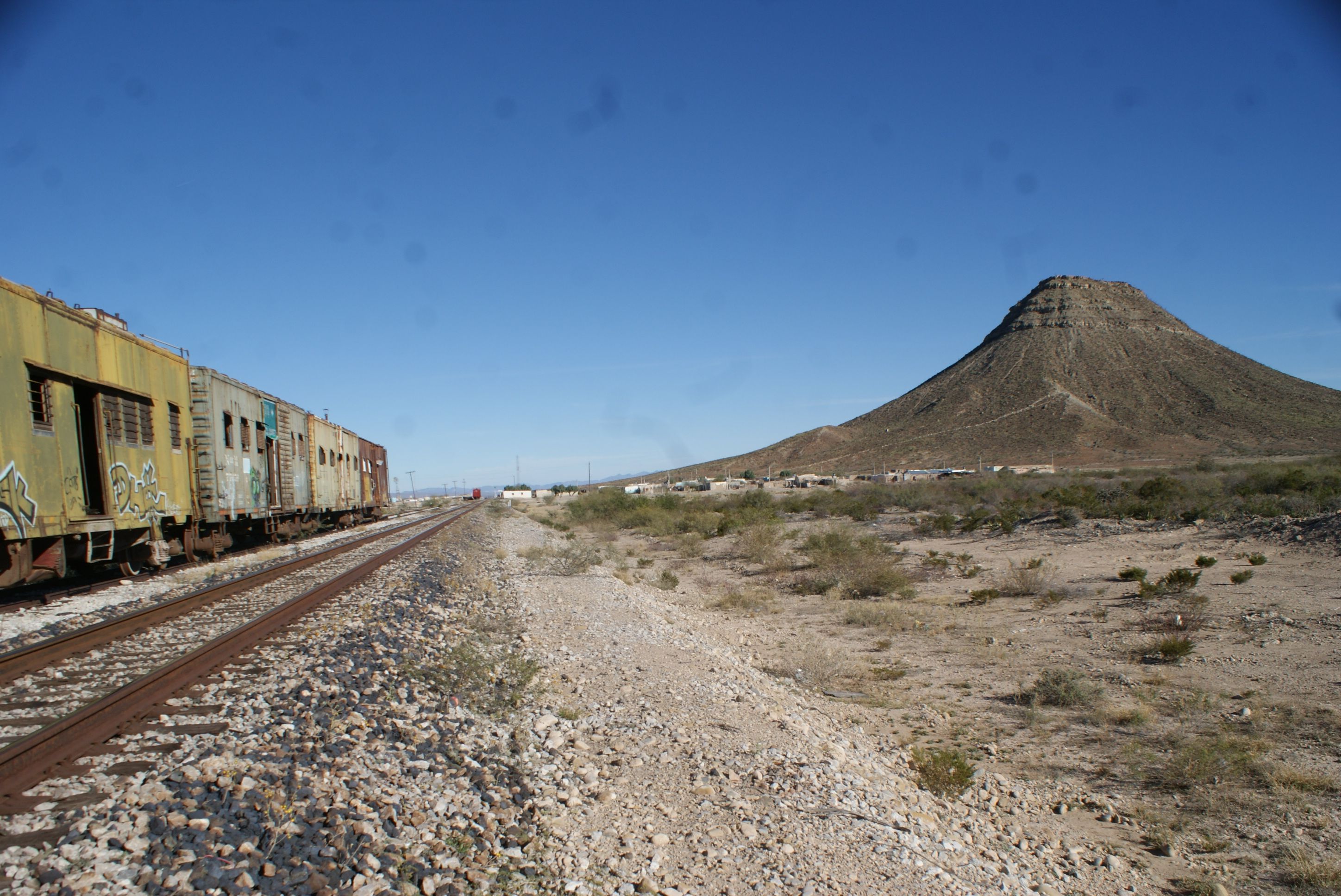 Estación MARTE, Coahuila